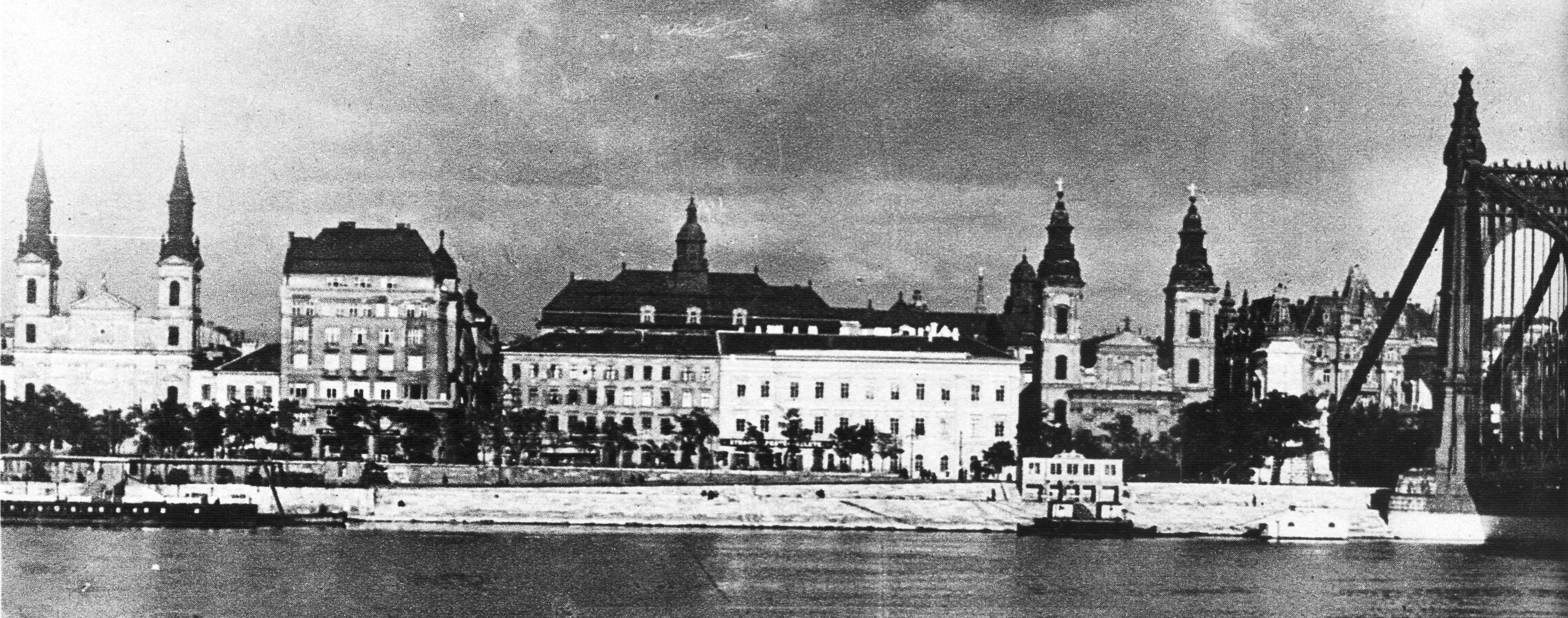 A pesti dunapart a régi Erzsébet híd mellett